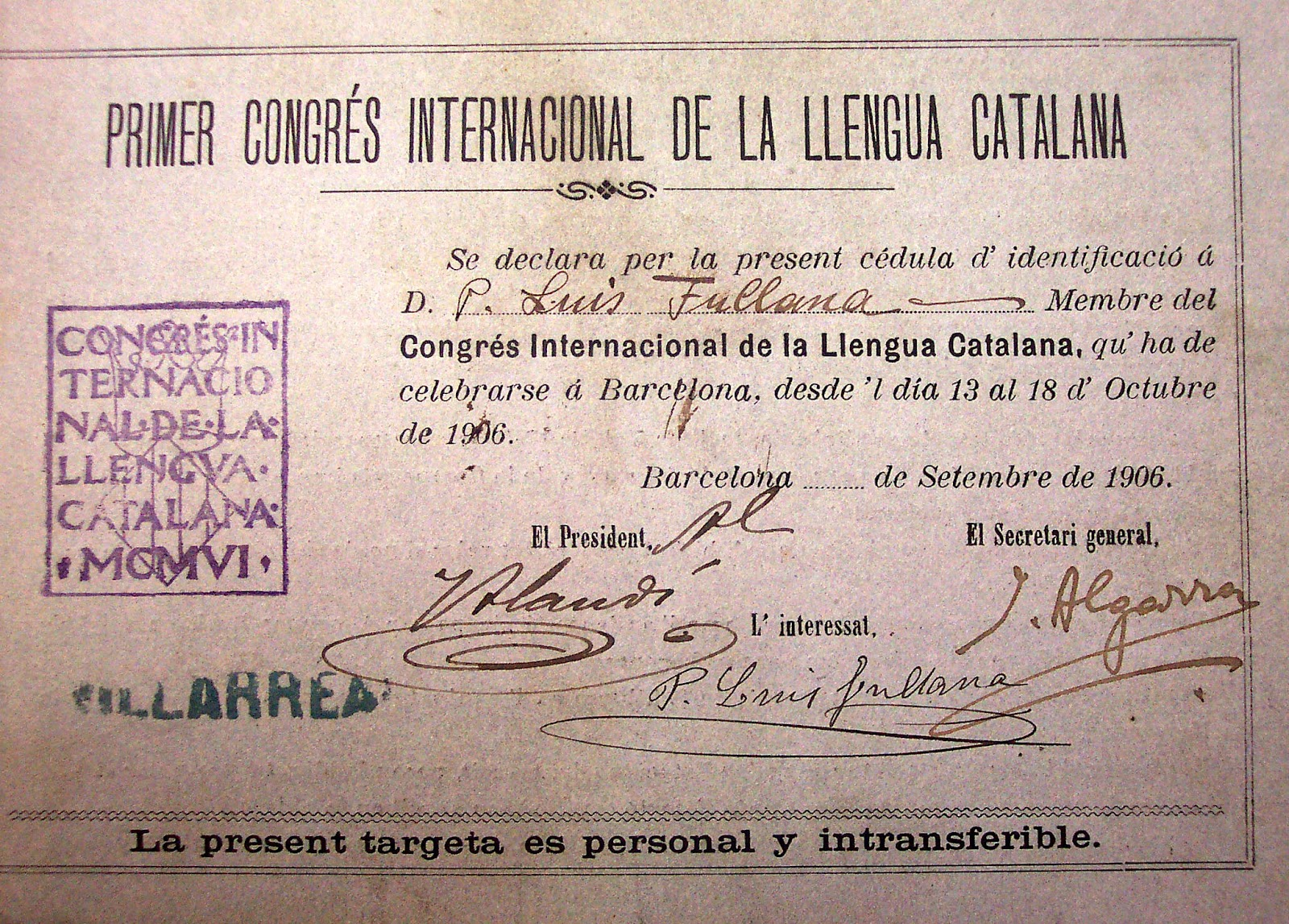 Targeta de Lluís Fullana al I Congrés de la Llengua Catalana (1906)